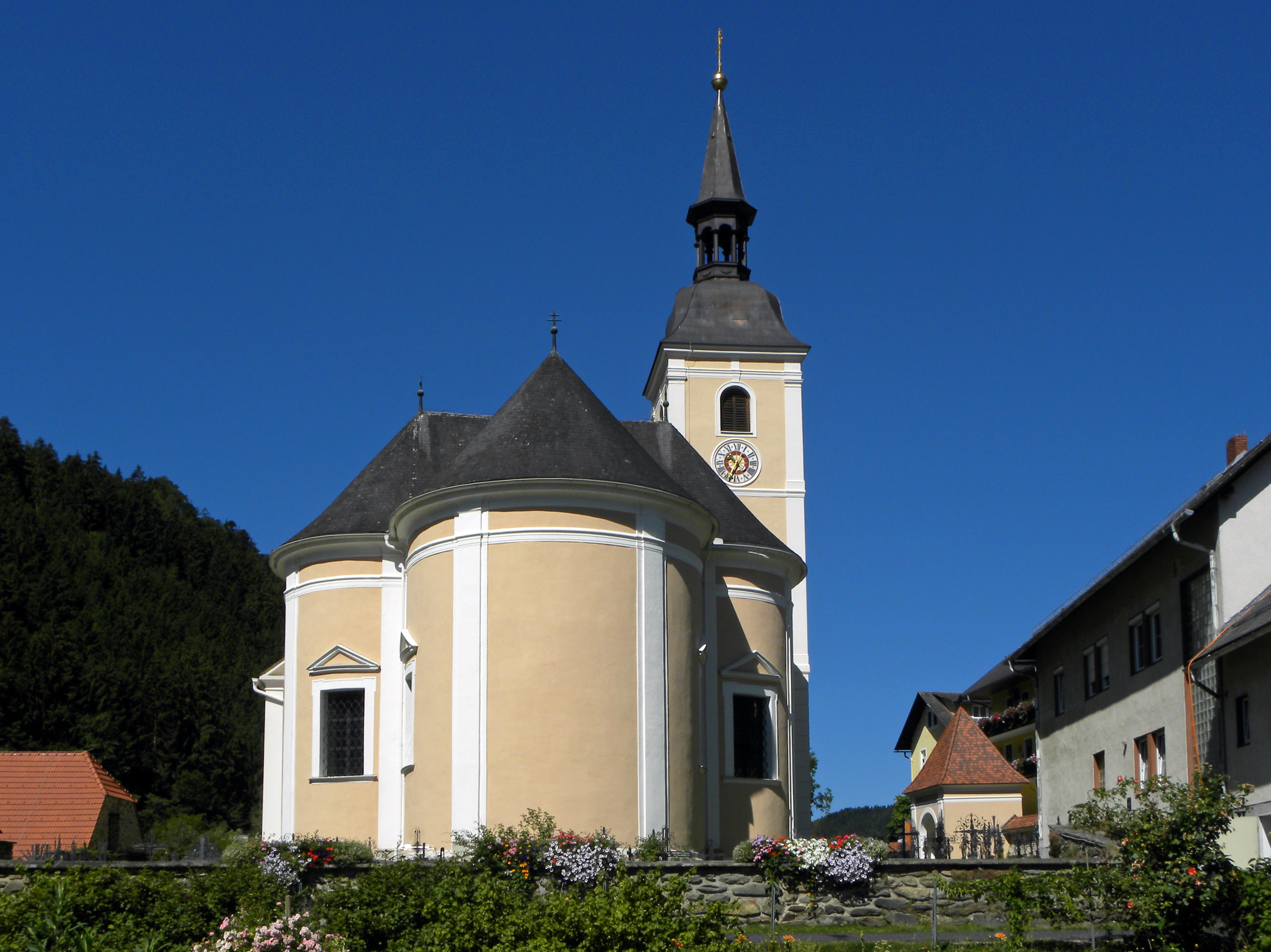 Kath. Pfarrkirche hll. Peter und Paul und Friedhof